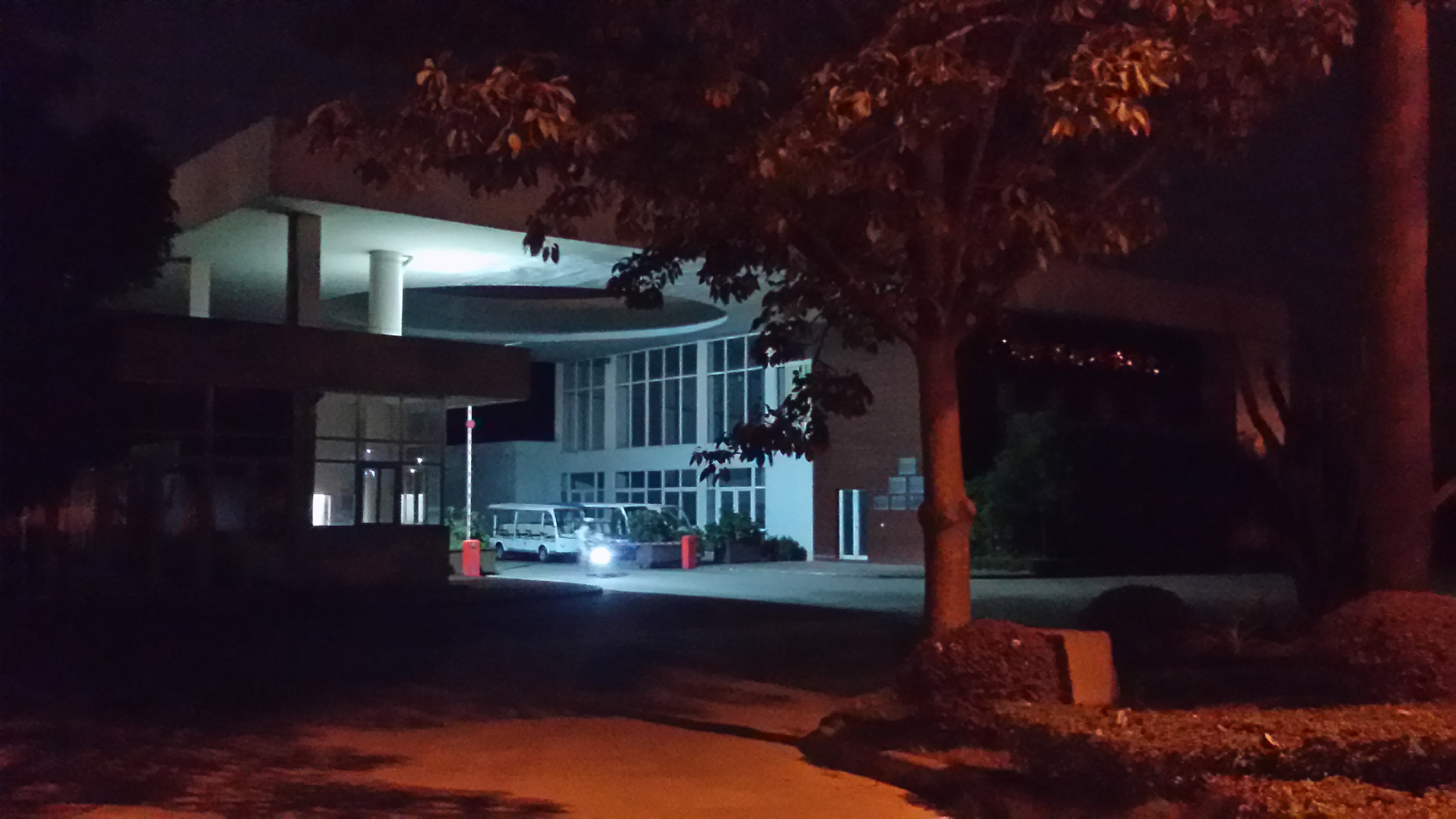 粵語: 廣州水果世界